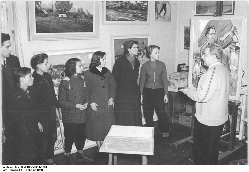 Magdeburg, Jugendstunde mit Georg Speck Zentralbild Biscan Vgt-Noa 11.2.1958 Schüler besuchen Maler-Atelier Eine Gruppe von Schülern der Leibniz-Grundschule in Magdeburg, die an der Jugendweihe teilnehmen, besuchte in Begleitung ihrer Lehrers Dieter Schöneberg den Maler Georg Andreas Speck in seinem Atelier. Der Künstler gab den Jungen und Mädchen einen Überblick über sein Schaffen und erklärte ihnen, wie seine Werke entstehen. UBz: Georg Andreas Speck erklärt den Schülern einige seiner Arbeiten.